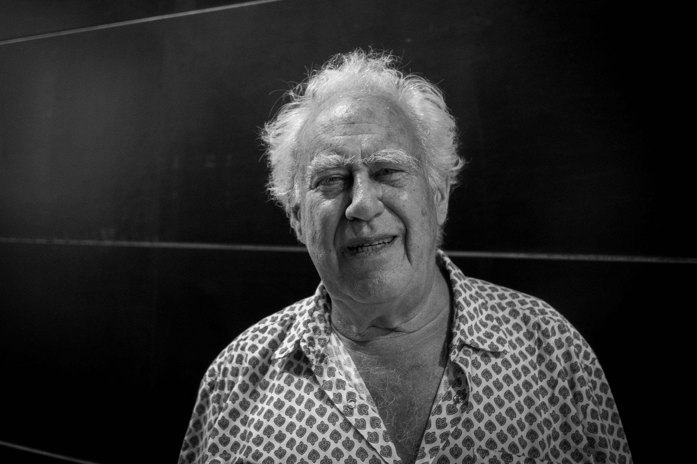 Hans Silvester par Claude Truong-Ngoc en septembre 2019